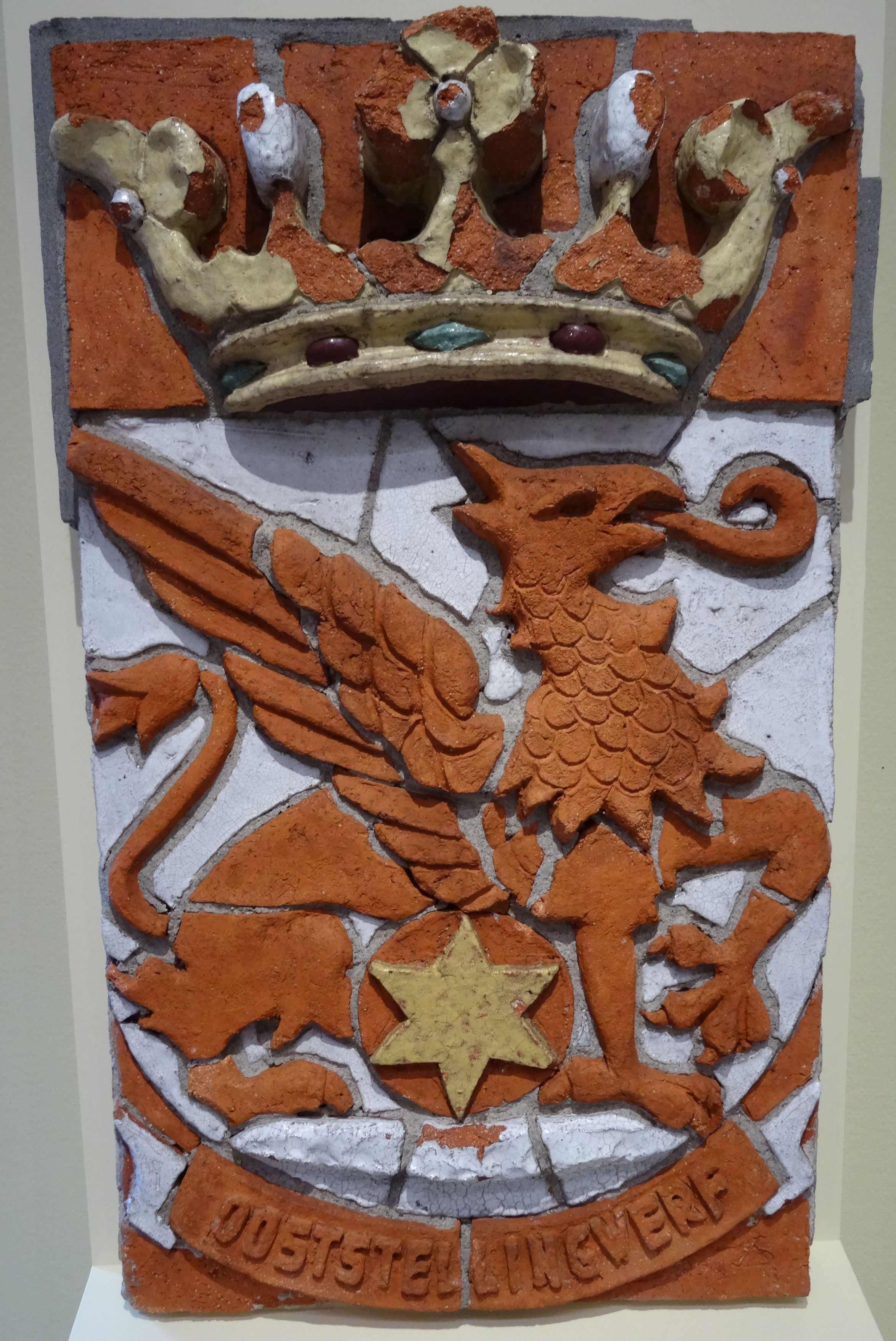 Op initiatief van burgemeester G.A. Bontekoe maakte Anno Smith in 1973 voor alle gemeentelijke gebouwen een steen met het wapen van de gemeente Ooststellingwerf. Deze steen (bruikleen van Stichting De Grijpvogel) was in 2015-2016 te zien in het Groninger Museum tijdens een tentoonstelling over Smith.